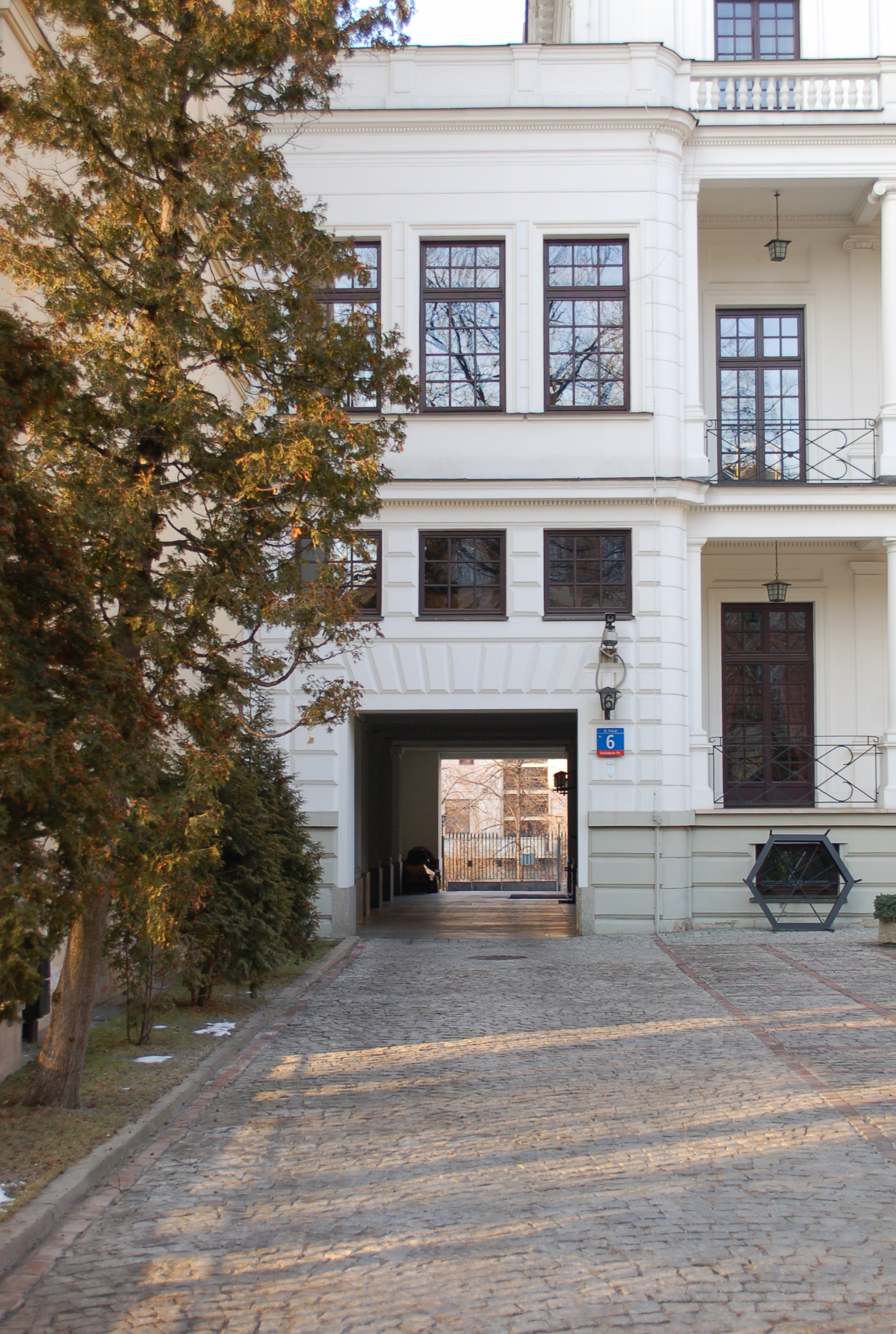 Przeździecki palace in Foksal street in Warsaw